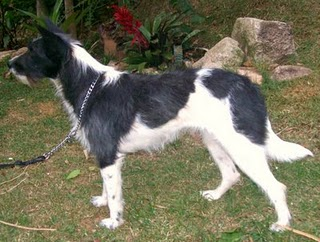 Cão da raça brasileira podengo crioulo.